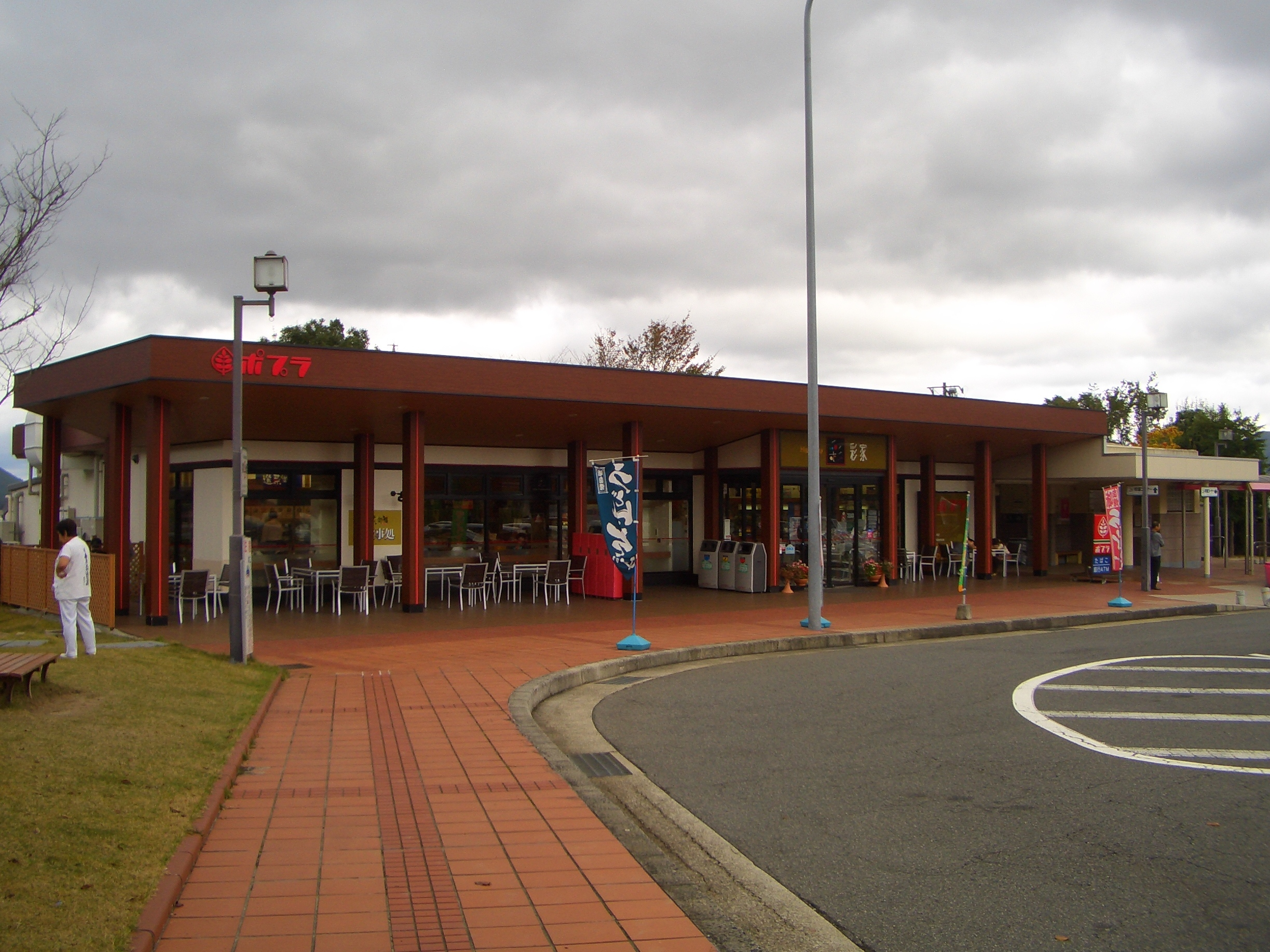 奥屋パーキングエリアの写真